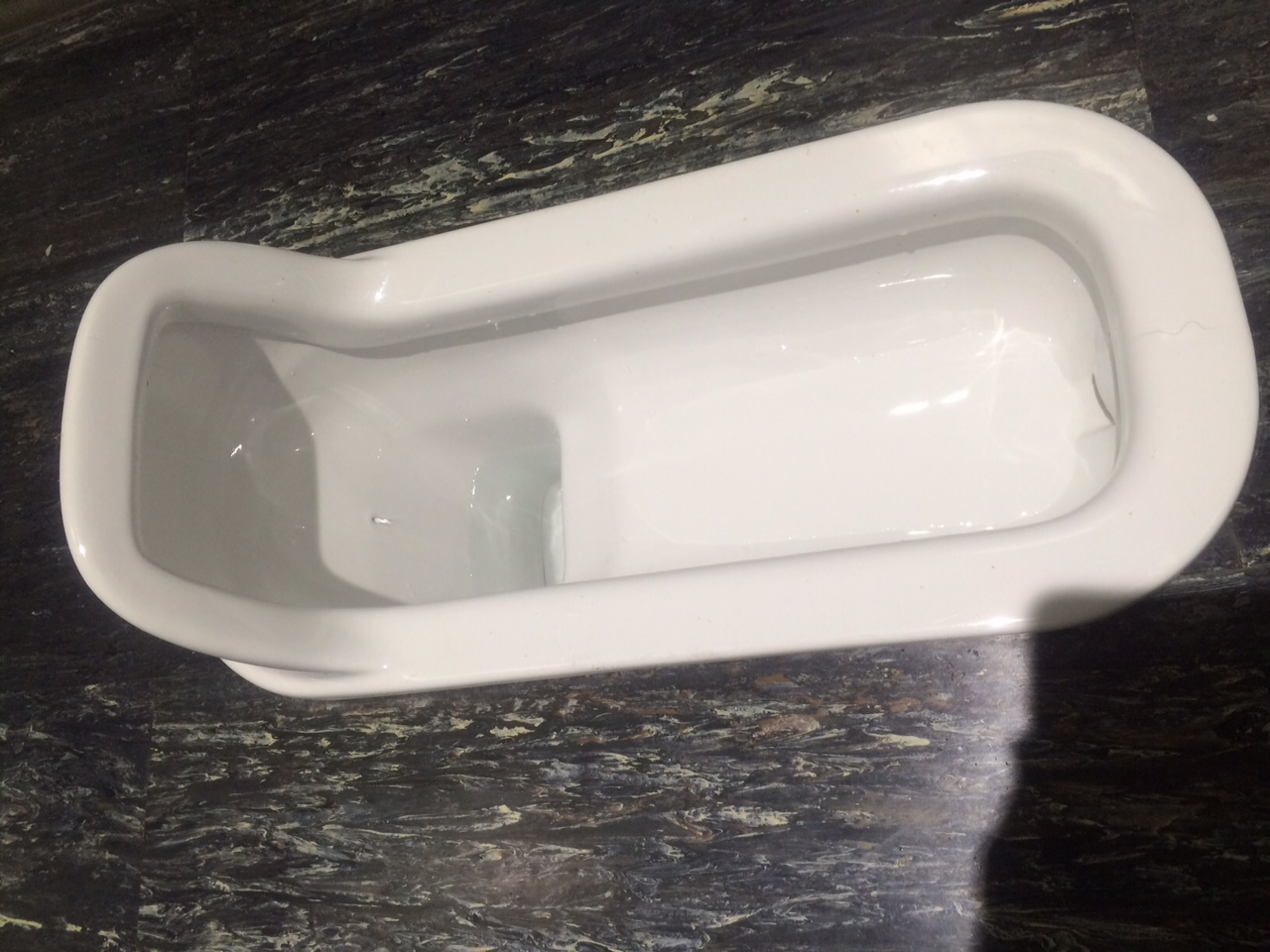 TOTO C755U